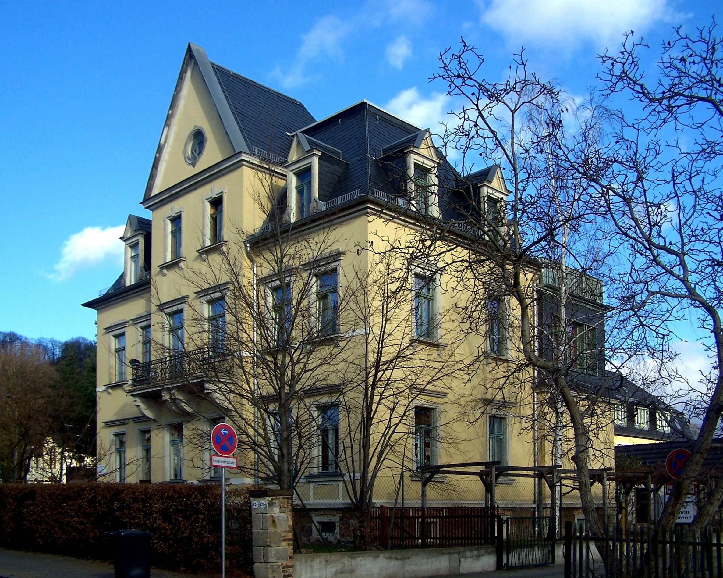 Oberlößnitzer Rathaus (Hauptstr. 49) in Radebeul